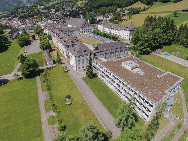 Heutige Stiftsschule Engelberg mit Internatsgebäude